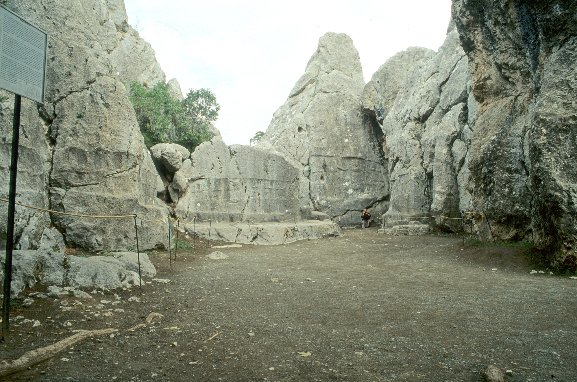 Yazilikaya, hethitisches Heiligtum bei Hattusa, Kammer A